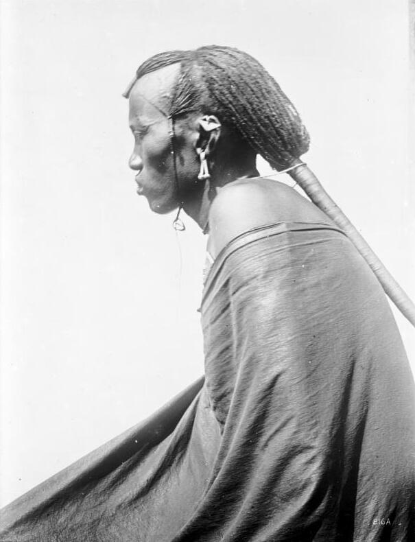 Massai